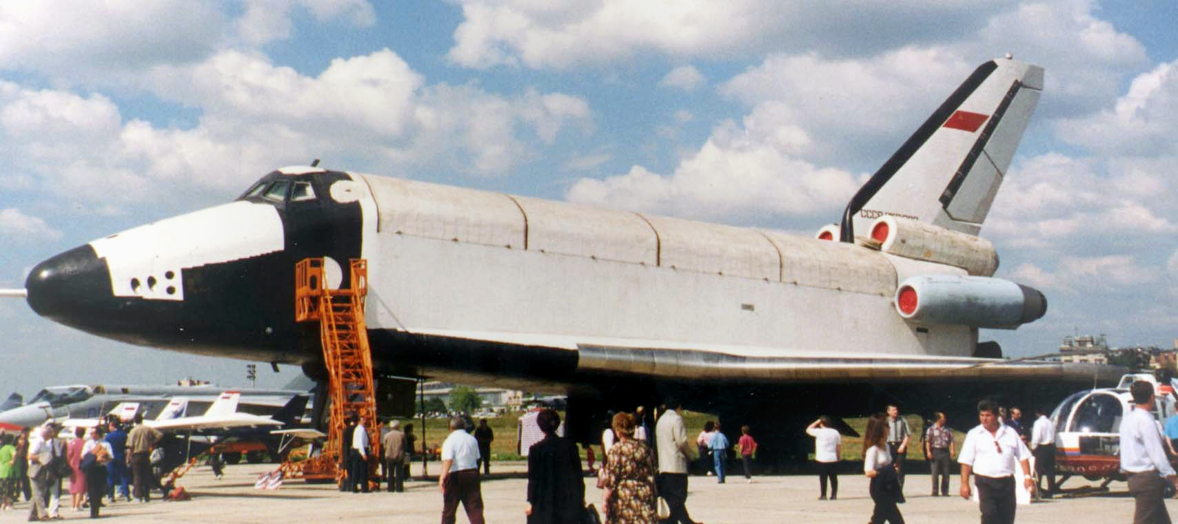 Foto an der MAKS 1997, Buran Atmosphärenjet BTS-002